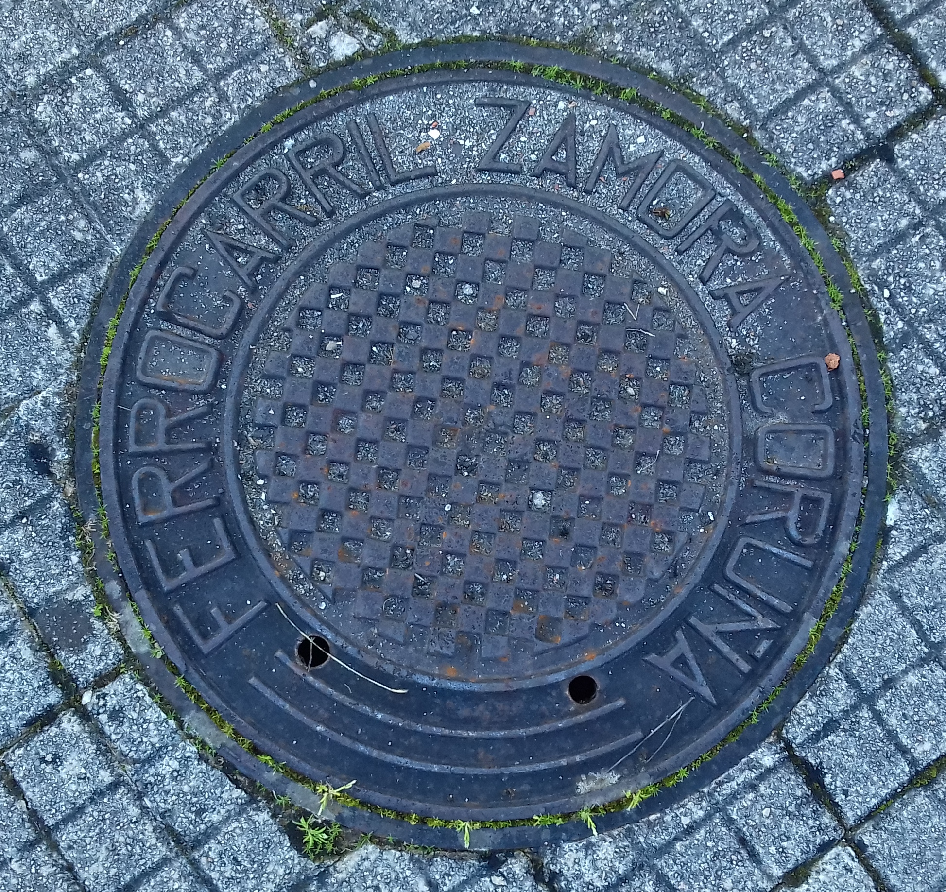 Tapa de rexistro no Carballiño